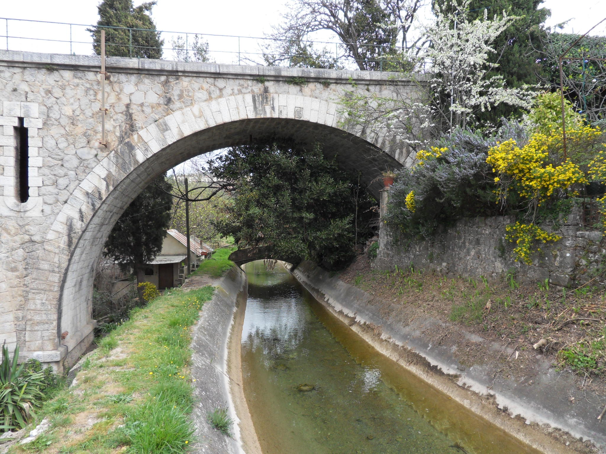 Grasse-Ligne Central-Var Grasse. Avenue Louis Icard. Viaduc sur le canal de la Siagne. Vue sur une arche. Viaduc dénommé viaduc de la Pouirraque.